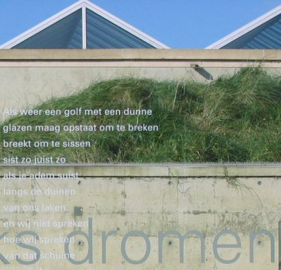 Zelfgemaakte foto. 'De transparant', glaswand met literaire teksten ter afscheiding van parkeerplaats Museum Beelden aan Zee, Scheveningen, 1998. Wim Quist architectuur; Reynoud Homan typografie.